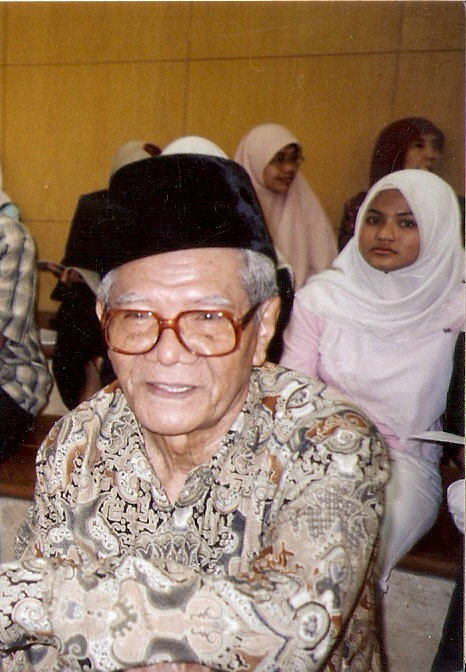 Foto Arena Wati